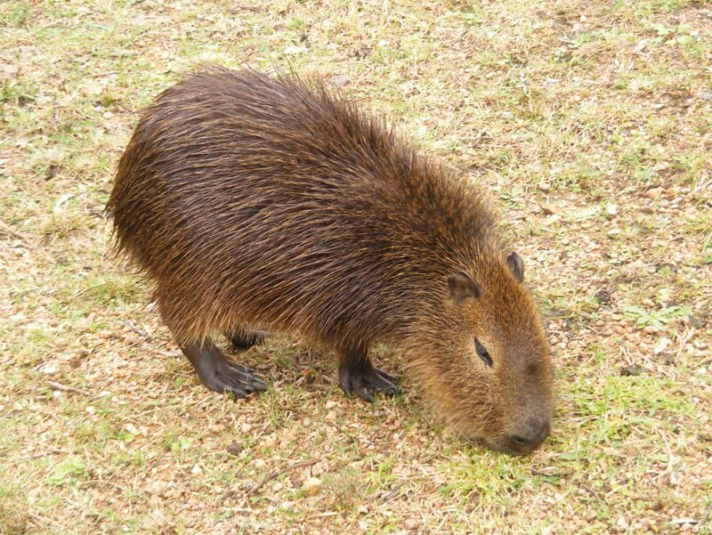 Cachorro de Carpincho (Capibara), en el zoológico de Pan De Azucar, Uruguay.